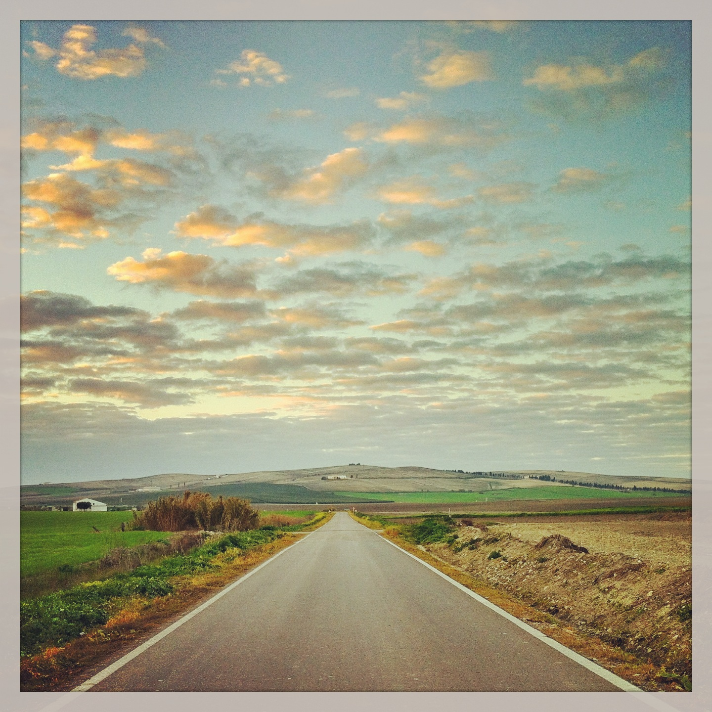 Carretera secundaria en la Campiña de Jerez (Andalucía, España)